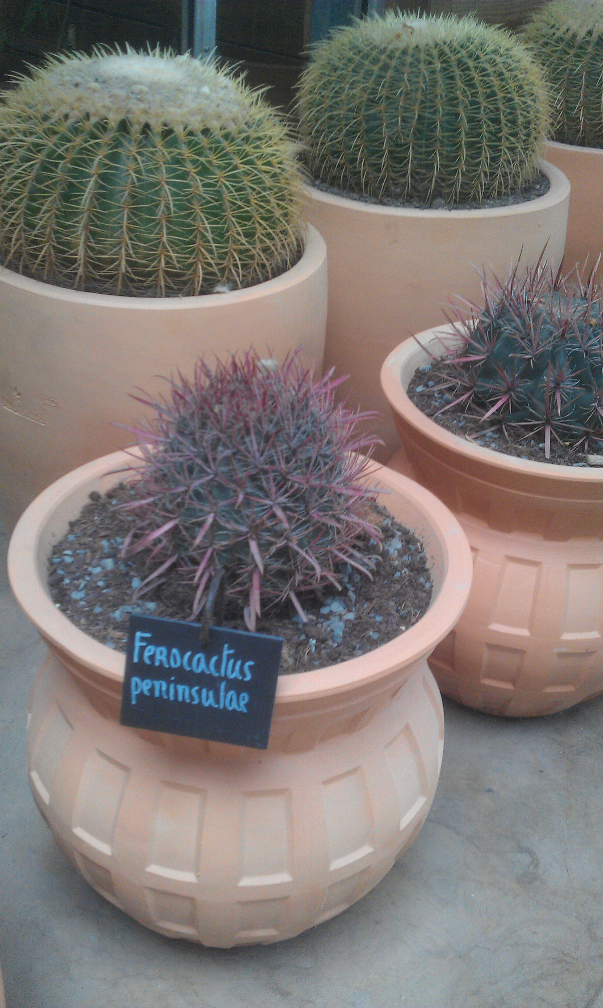 Ferocactus à Terra Botanica